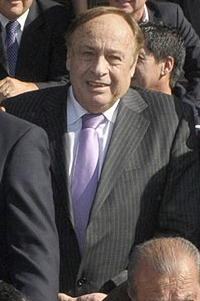 02-05-2011 Plan de infraestructura para el fútbol nacional chileno.